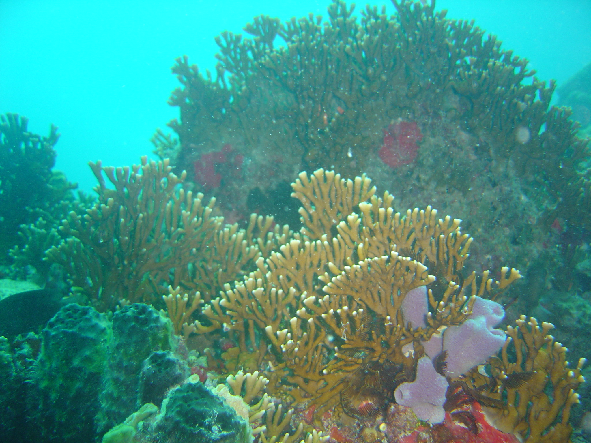 Naufrágio e recifes de coral no Nilo